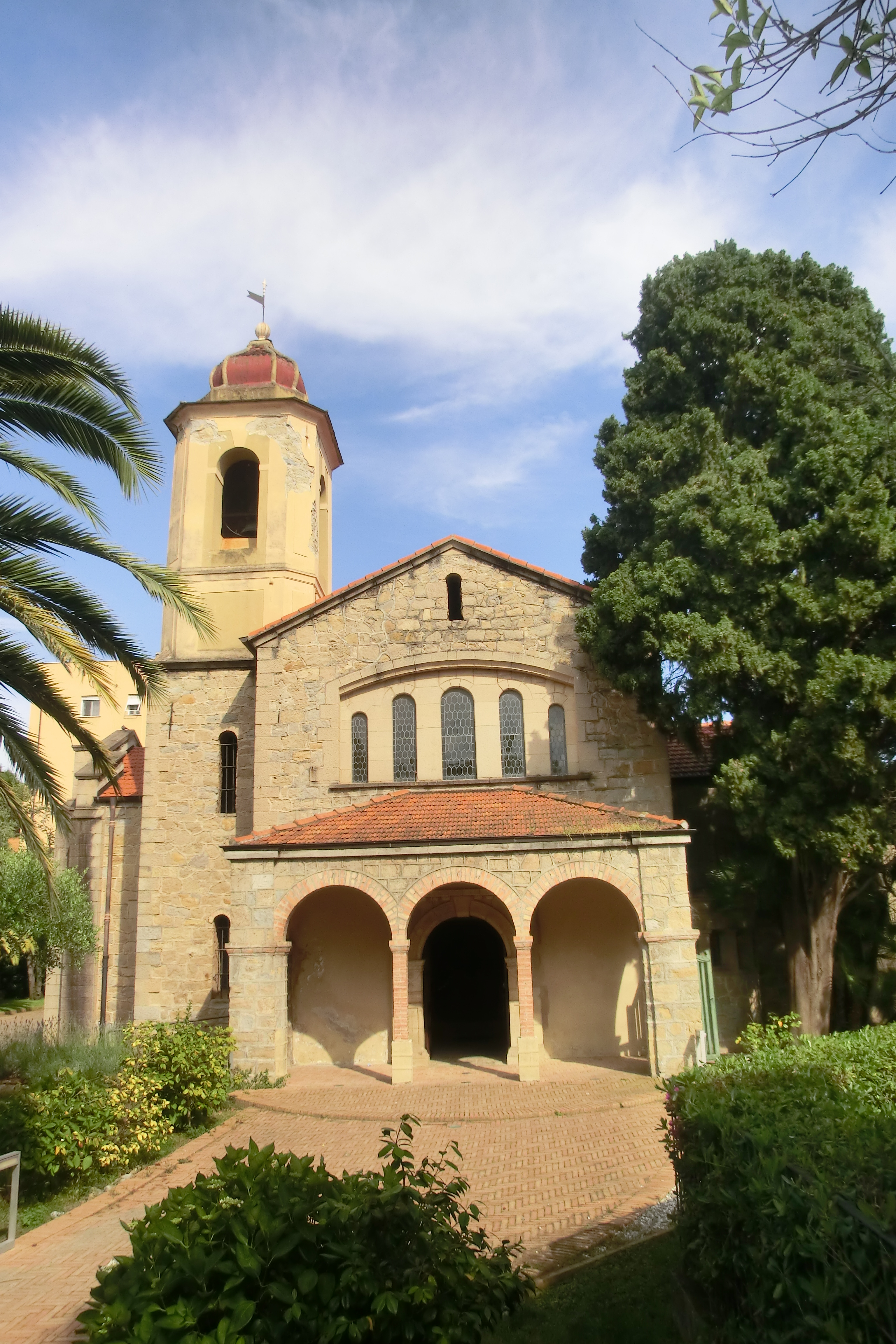 Ex Chiesa anglicana di Bordighera